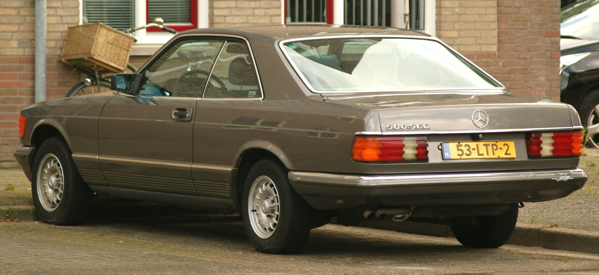 53-LTP-2